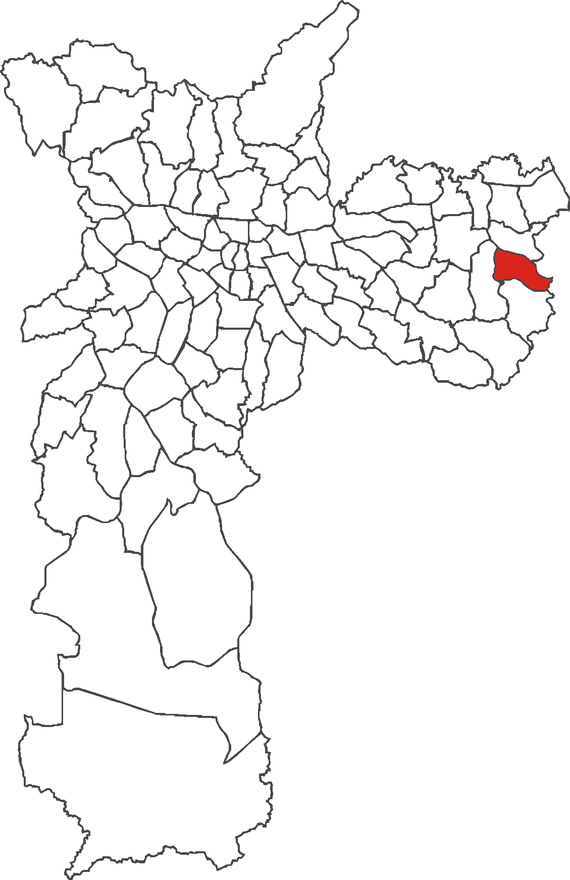 Localização do distrito de Guaianases no município de São Paulo.